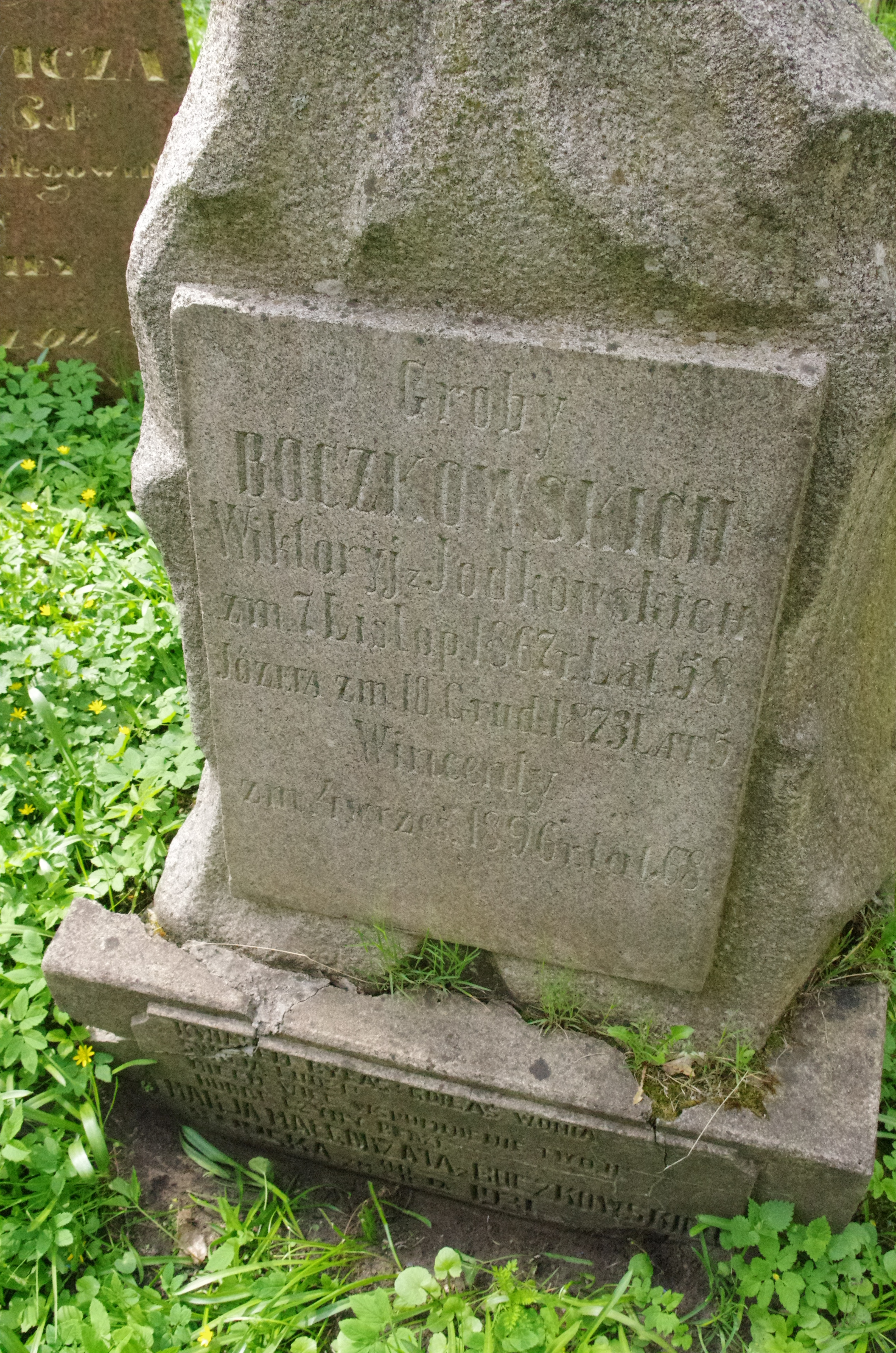 Bočkovskių antkapis Bernardinų kapinėse